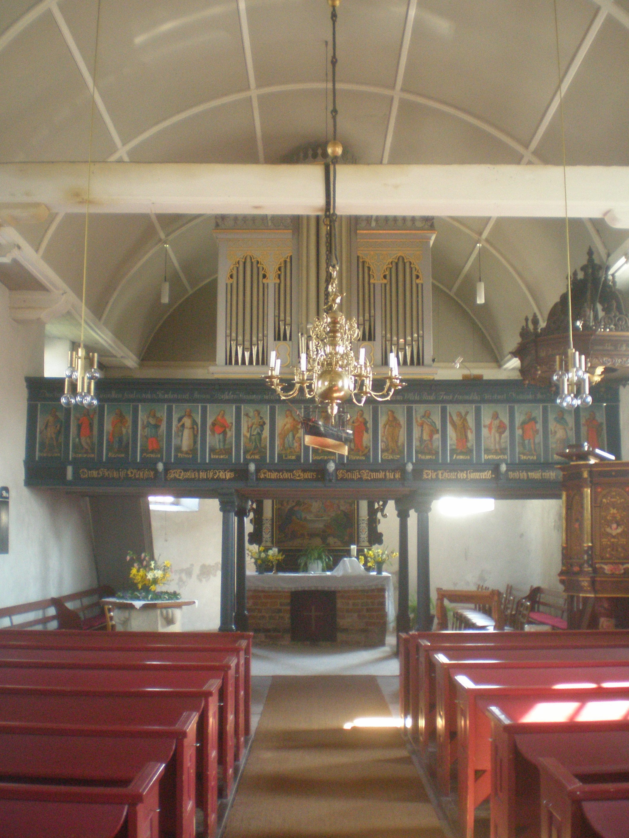 Orgel in Westerbur